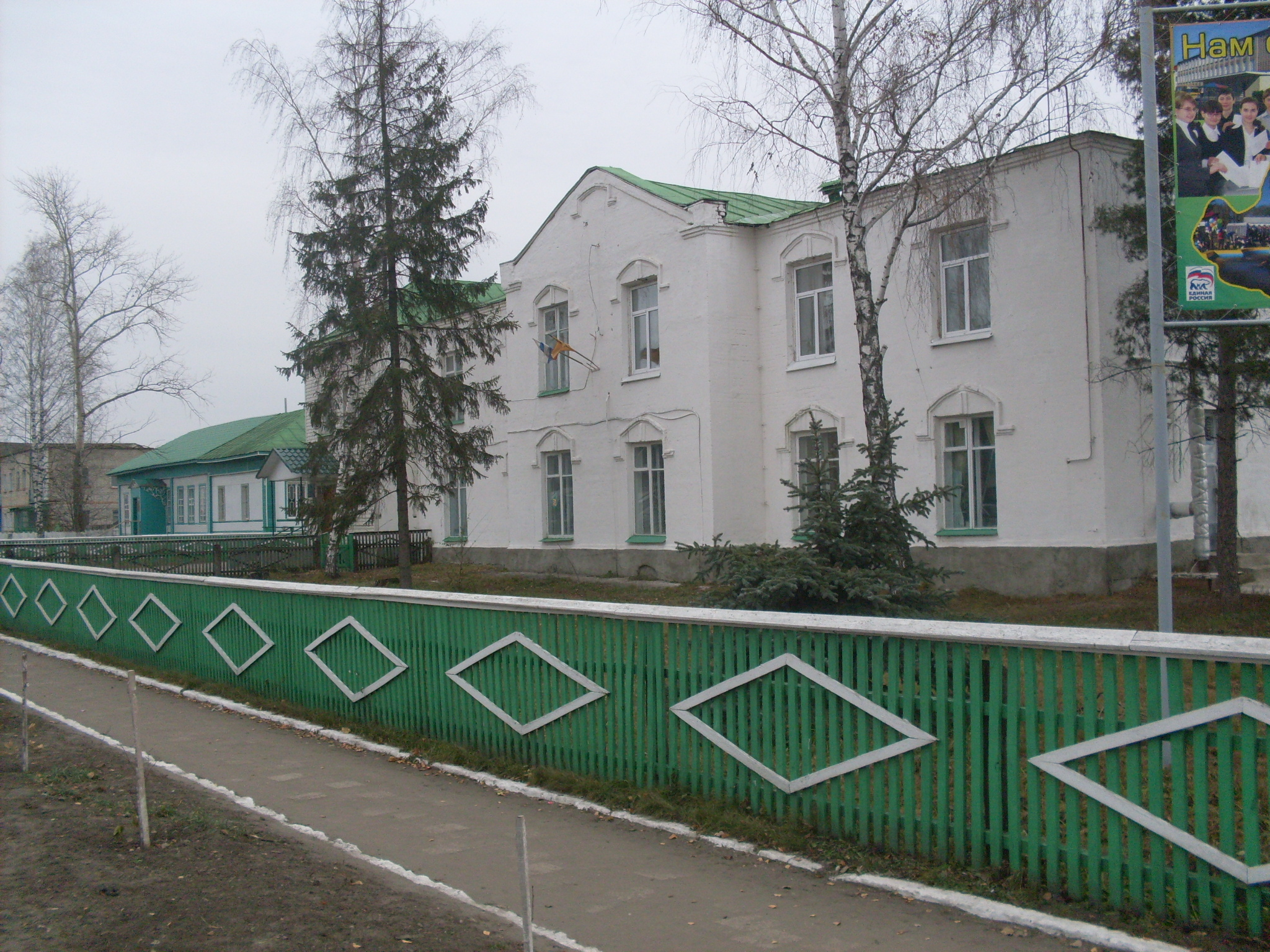 Беково. Администрация посёлка. 2011 год.